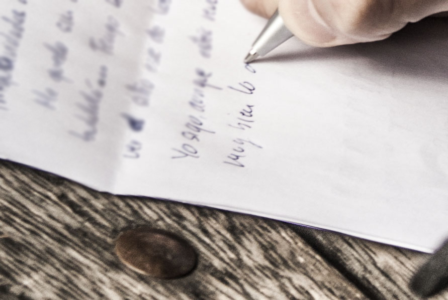 Detalle de la narración de una carta.